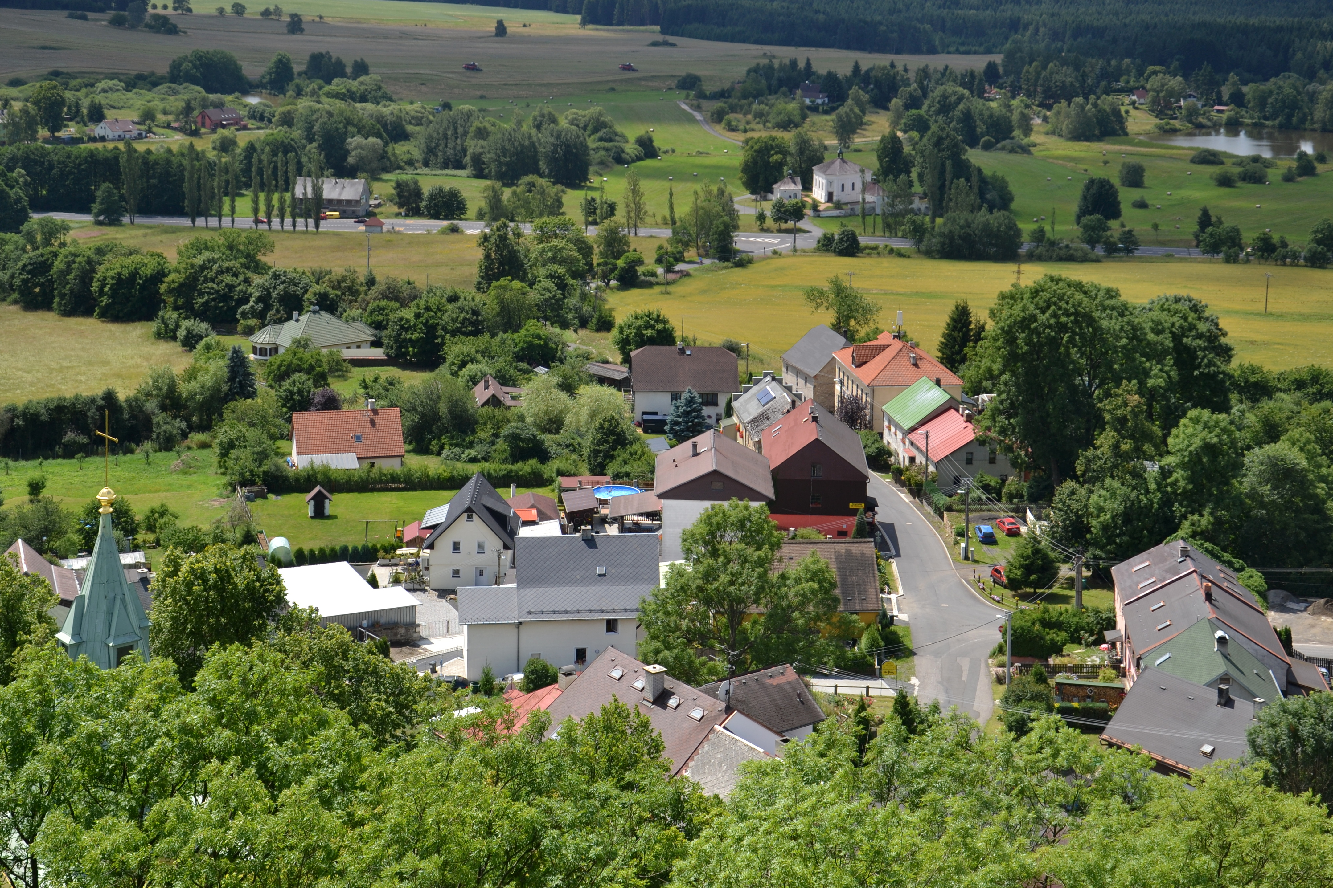 Andělská Hora – pohled z hradu na jižní část vesnice